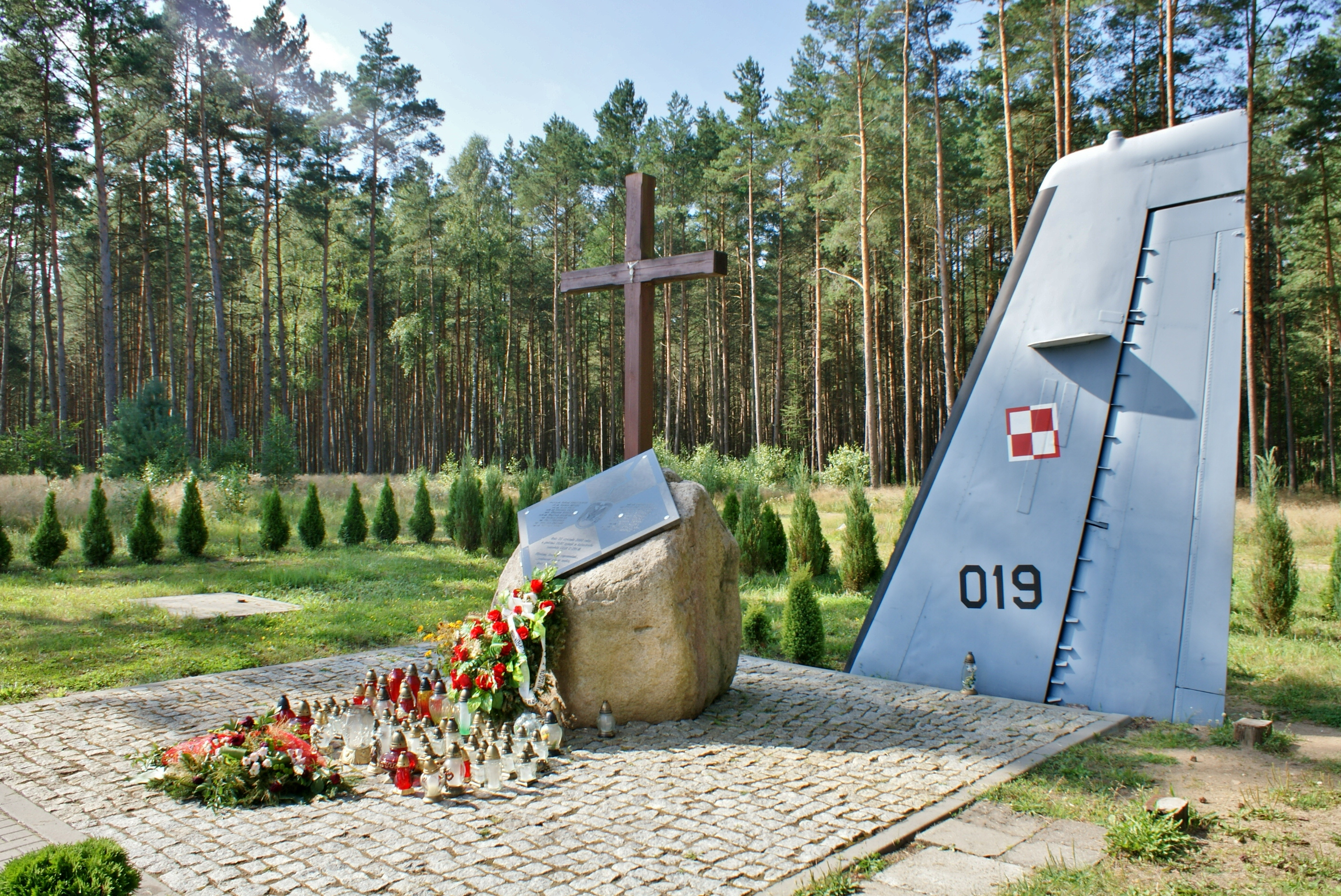 MIROSŁAWIEC – pomnik ofiar katastrofy samolotu CASA. Wojskowy samolot transportowy CASA C-295M należący do 13 eskadry lotnictwa transportowego w Krakowie 23 stycznia 2008 r. kilka minut po godzinie 19 rozbił się podczas podejścia do lądowania w pobliżu lotnisko wojskowego w Mirosławcu. W wyniku katastrofy wszyscy znajdujący się na pokładzie samolotu ponieśli śmierć - 4 członków załogi z 13 eskadry lotnictwa transportowego oraz 16 wysokich rangą oficerów, głównie z 1 Brygady Lotnictwa Taktycznego w Świdwinie. Żołnierze wracali z Warszawy z Konferencji Bezpieczeństwa Lotów Lotnictwa Sił Zbrojnych…